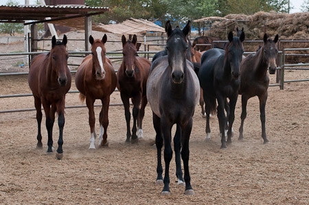 Studfarm in Turkmenistan